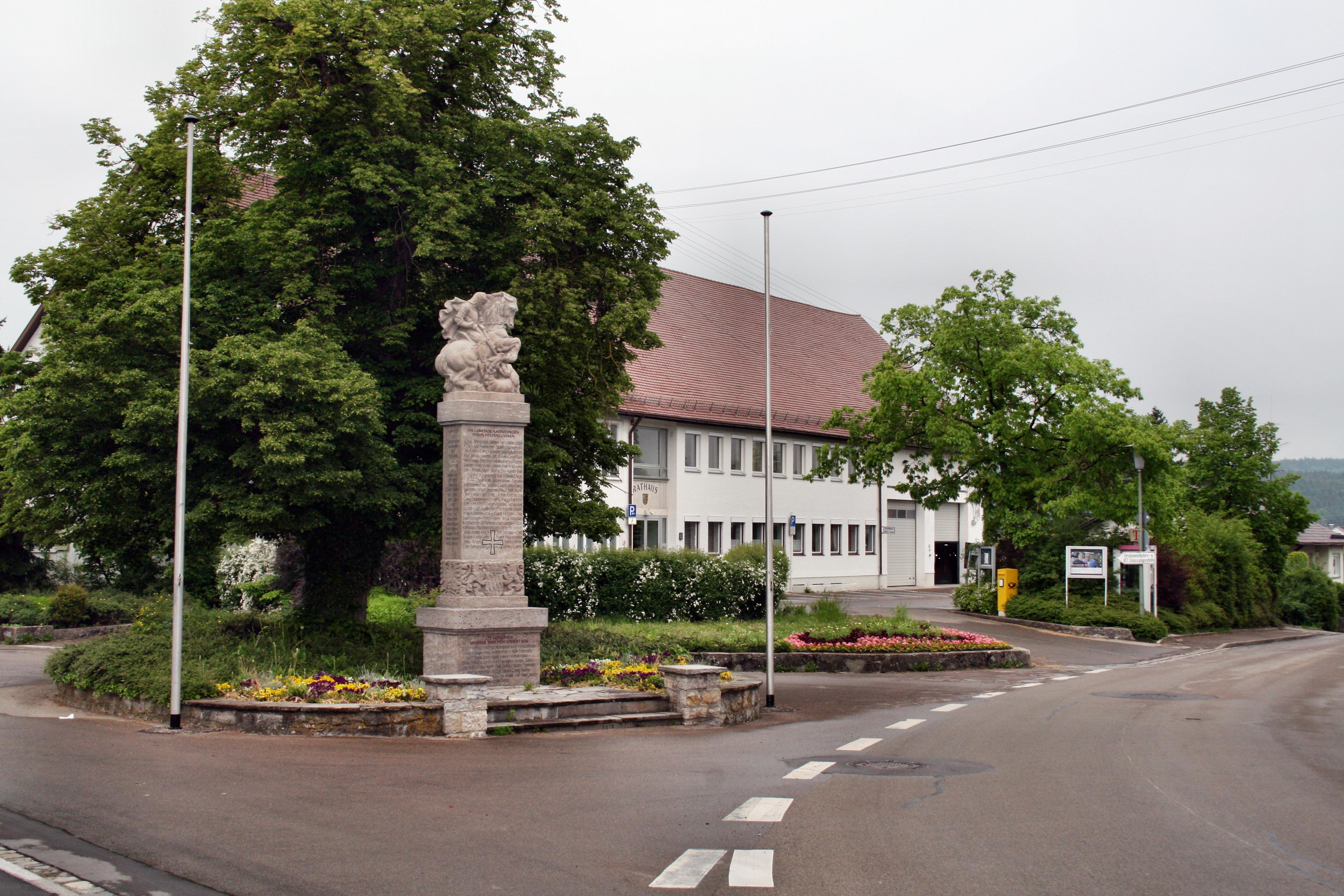 Das Kriegerdenkmal von Amendingen mit dem ehemaligen Rathaus im Hintergrund. Dieses wird heute von der Stadtverwaltung Memmingen als Straßenverkehrsamt und der freiwilligen Feuerwehr Amendingen e.V. benutzt.